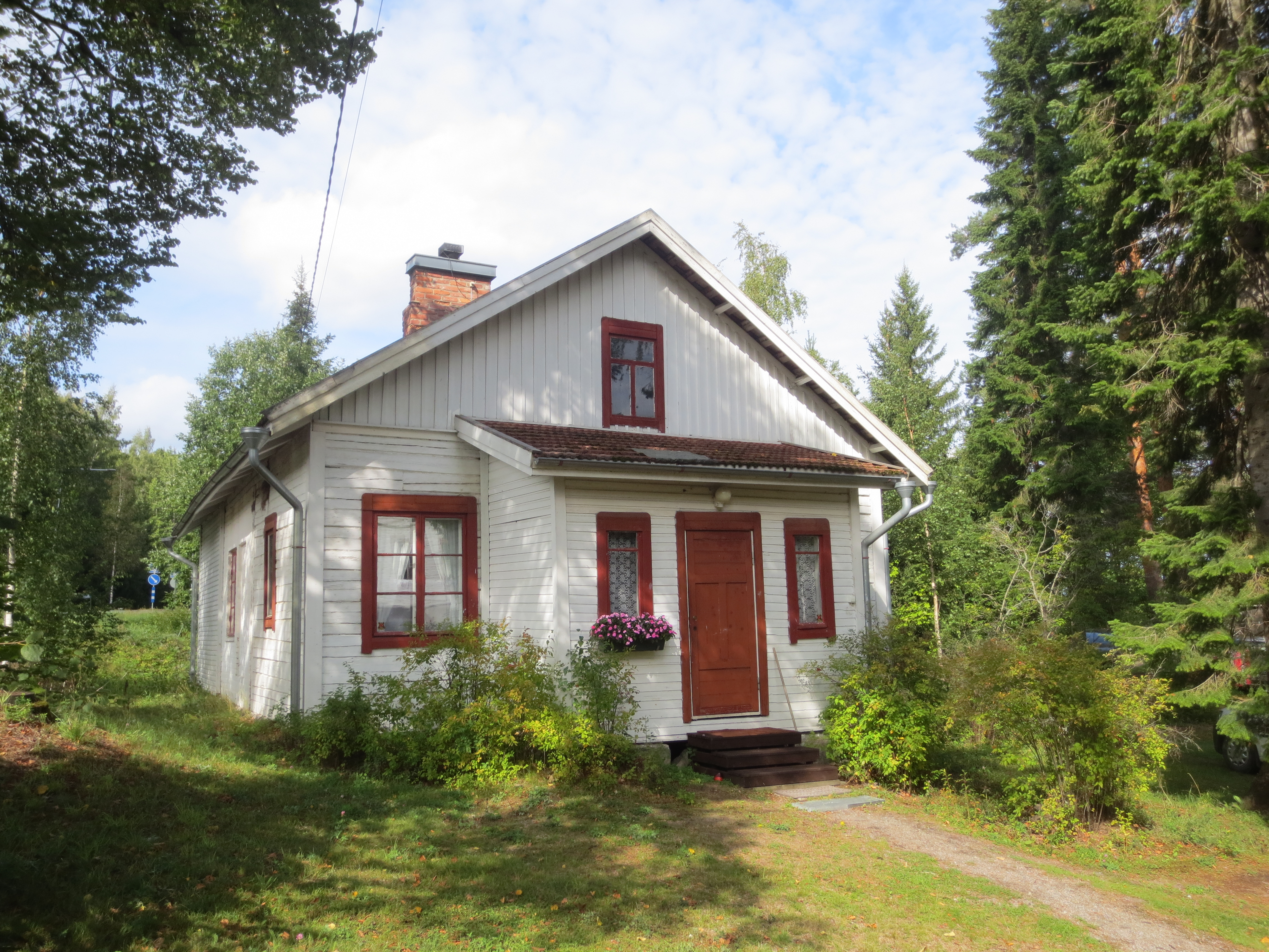 Kangasalan Lepokodin saunarakennus